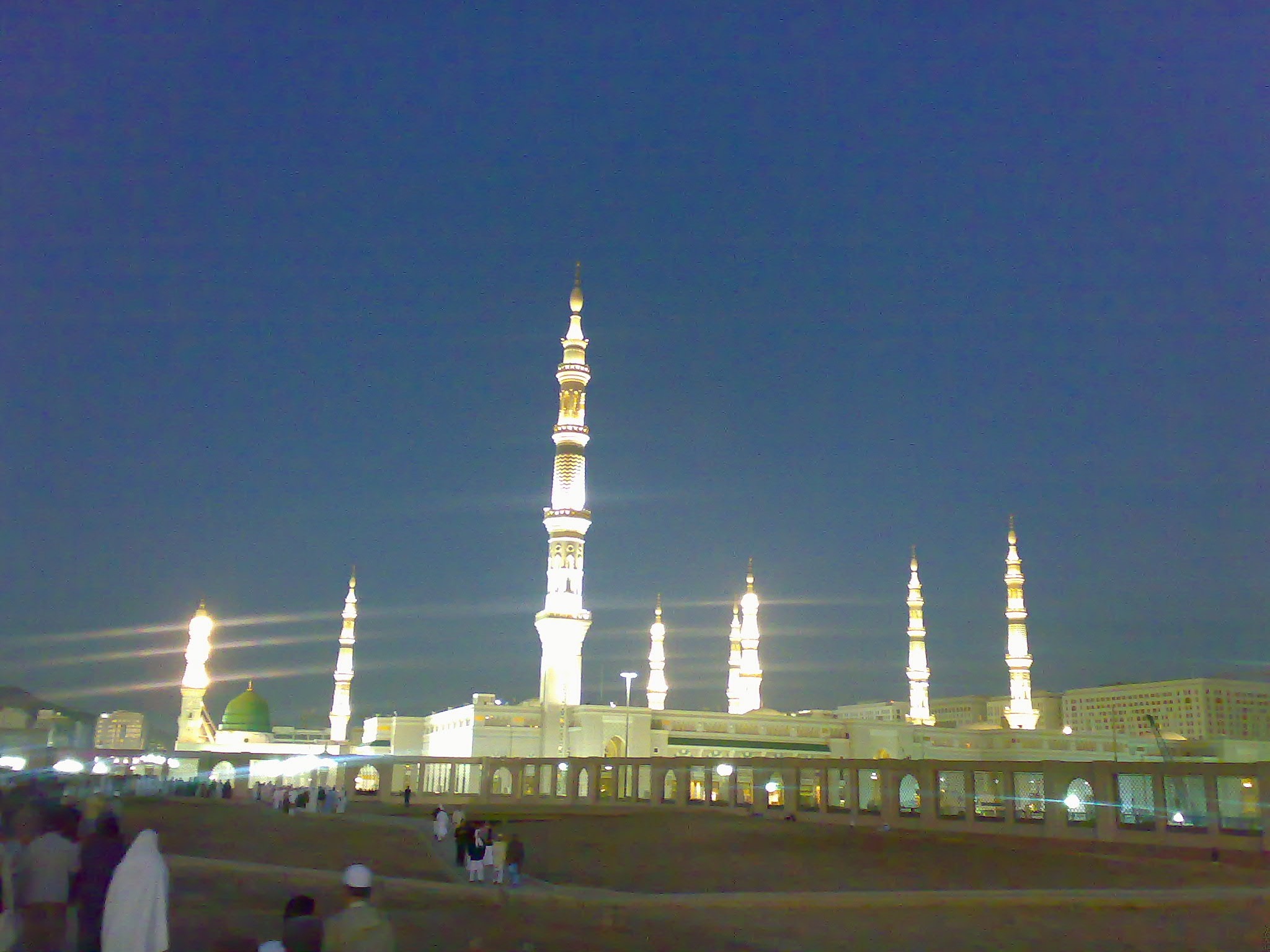 Mascid an-Nabavi, from grave-yard Bagy, Madina, Saudi Arabiya